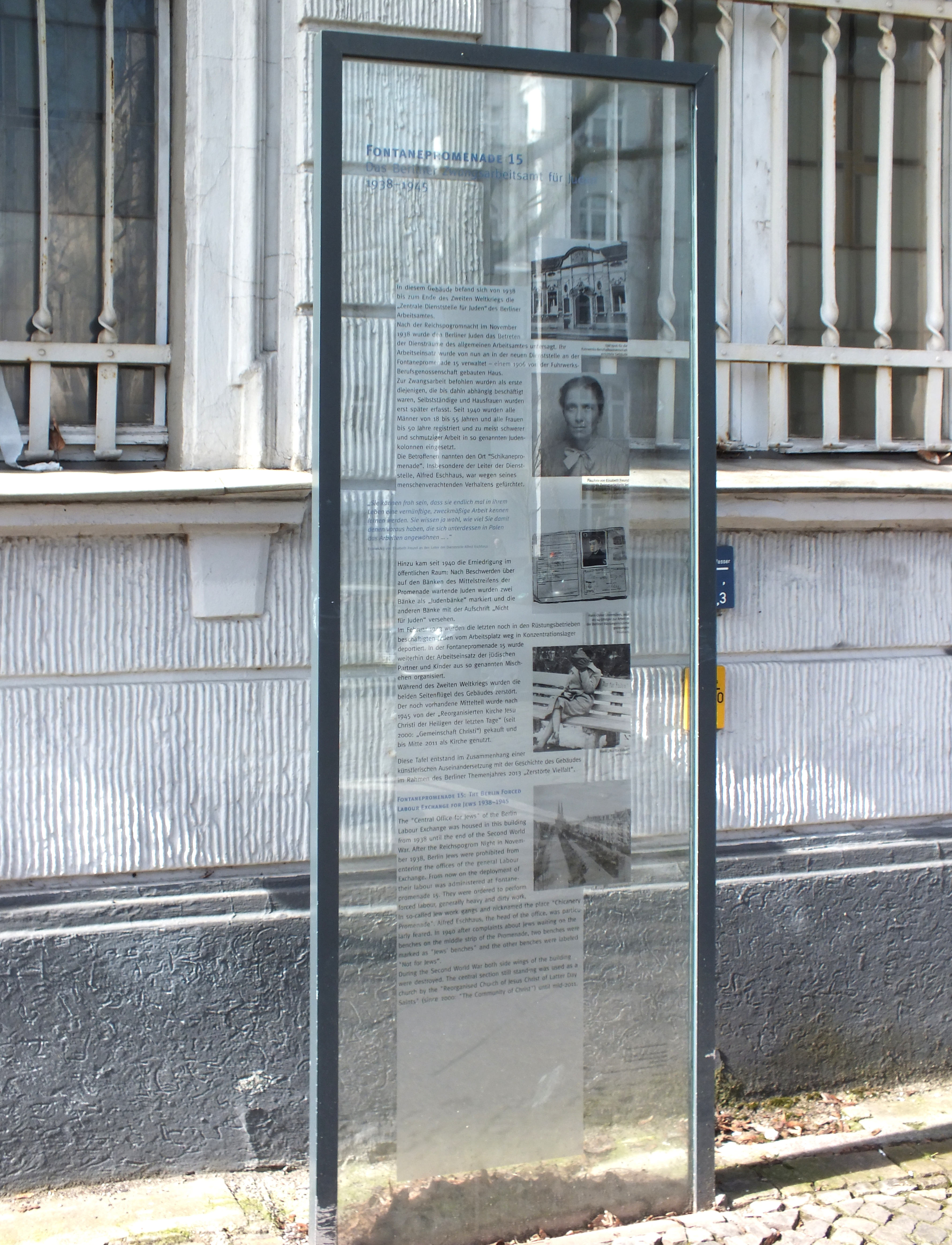 Fontanepromenade 15 in Kreuzberg: Gedenkstele